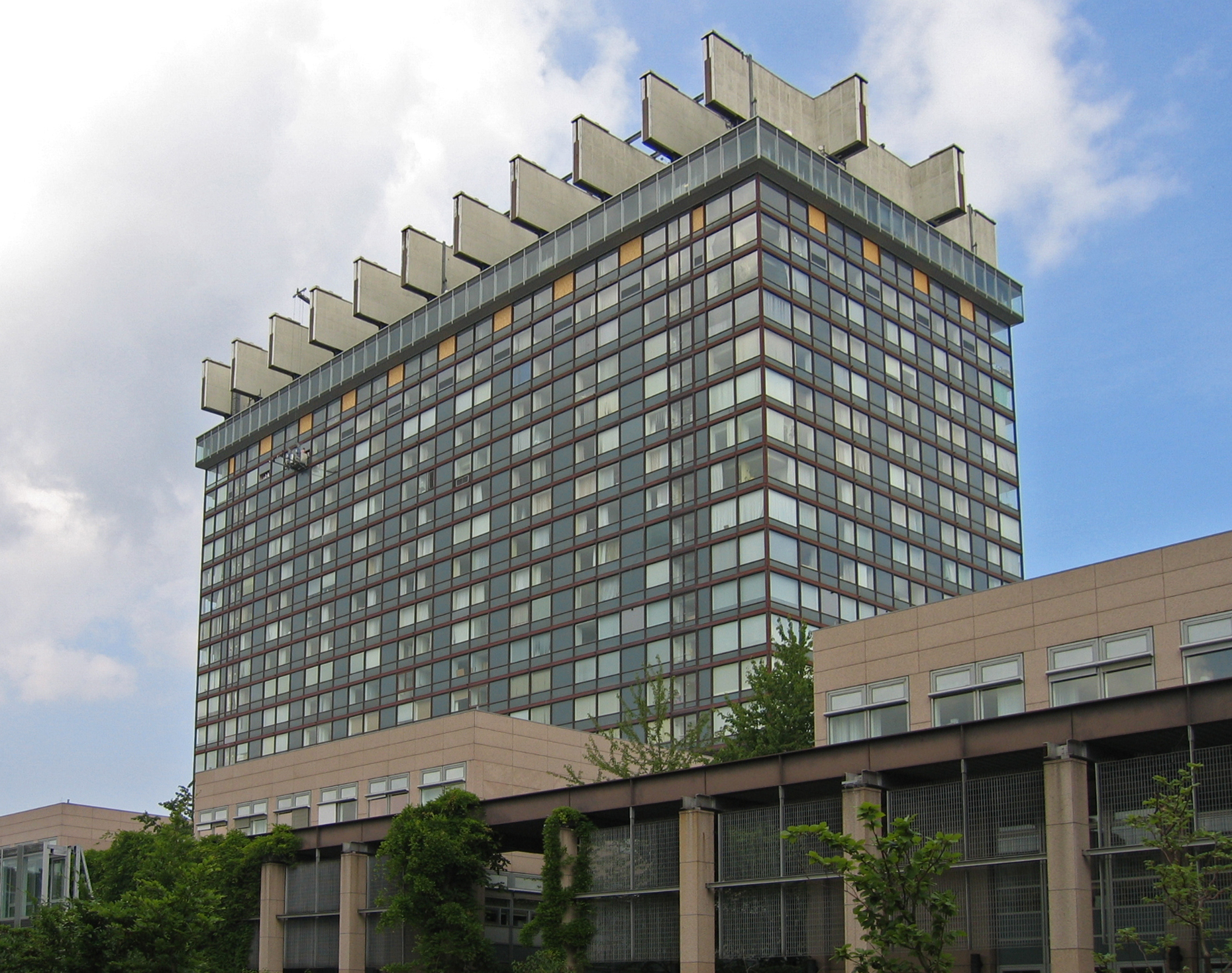 Universitätsklinikum Köln Hauptgebäude